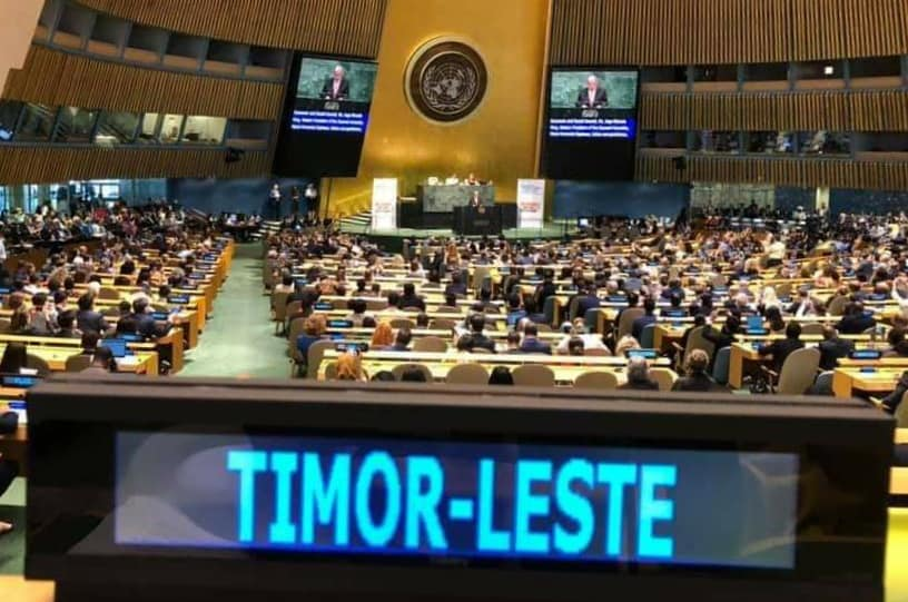 Osttimor bei der Generalversammlung der Vereinten Nationen